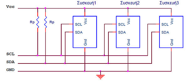 ΔίαυλοςI2C